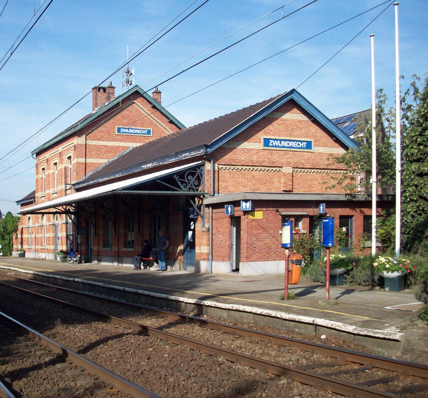 Station Zwijndrecht